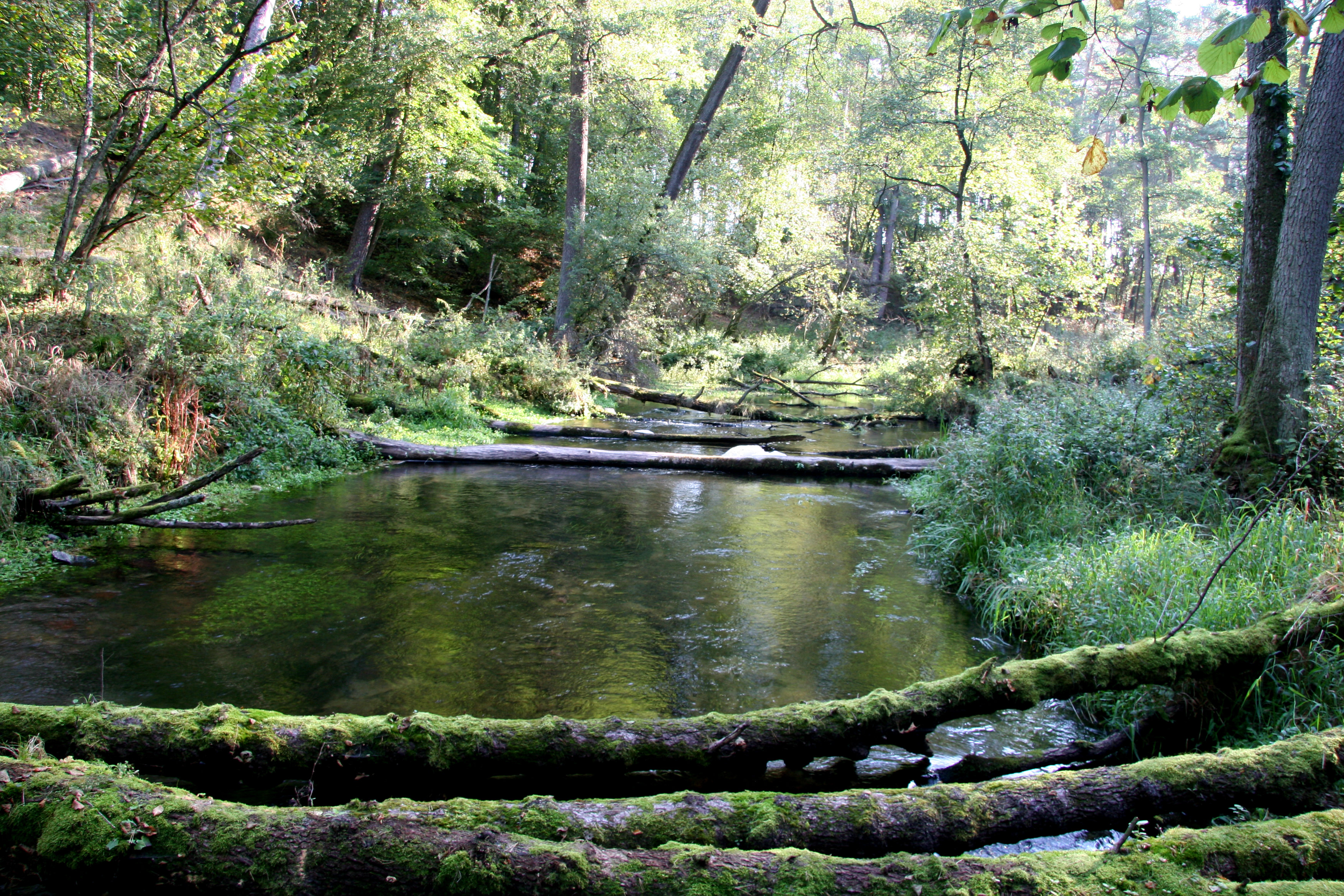 Bielska Struga, dopływ Brdy